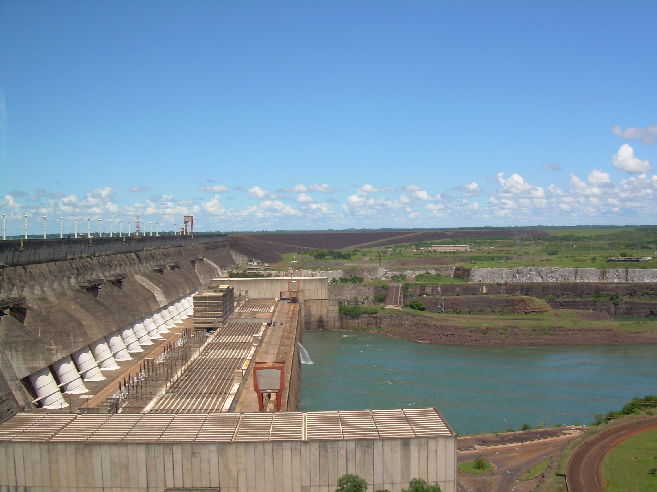 Itaipu